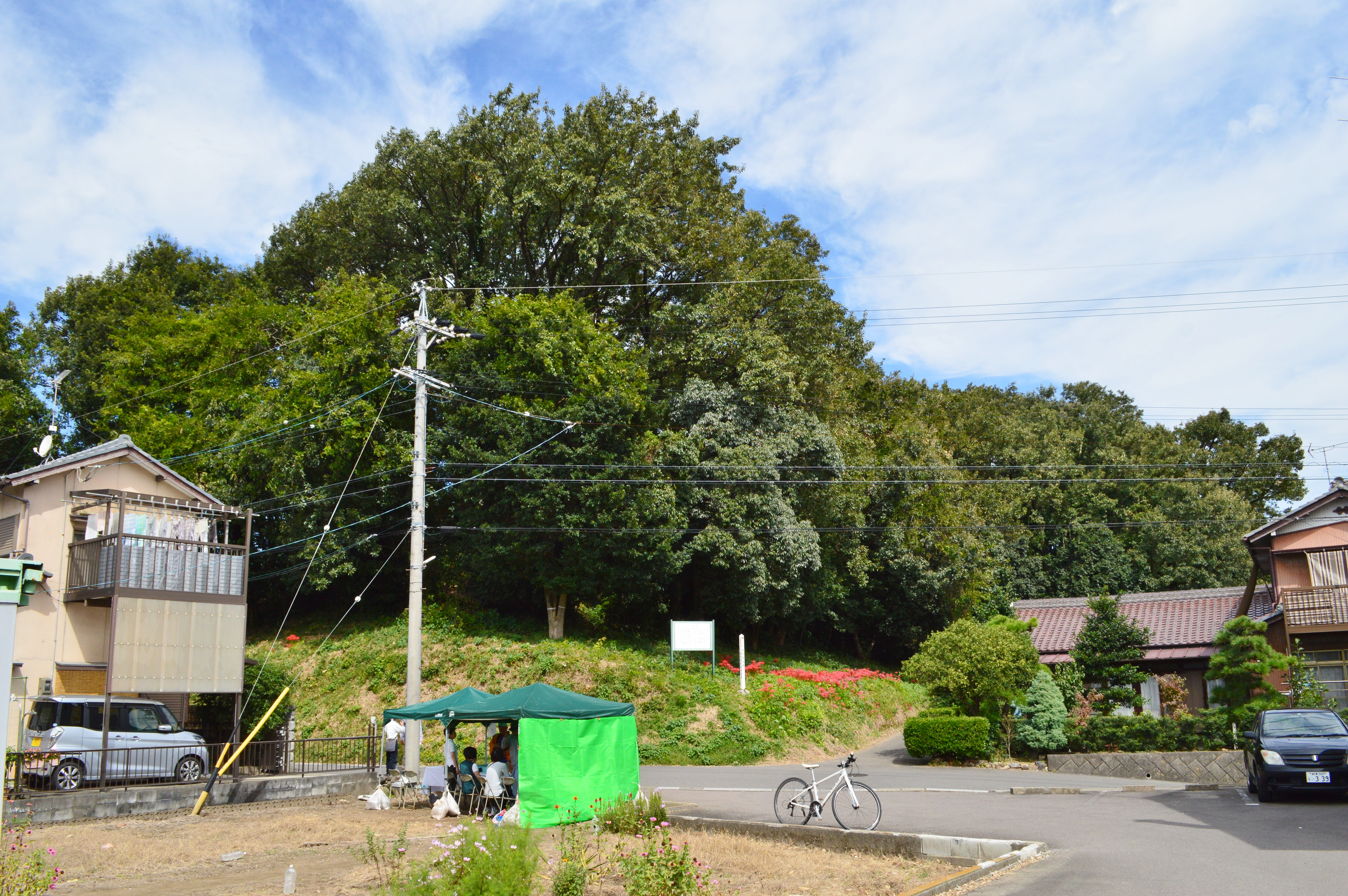 坊の塚古墳 墳丘全景